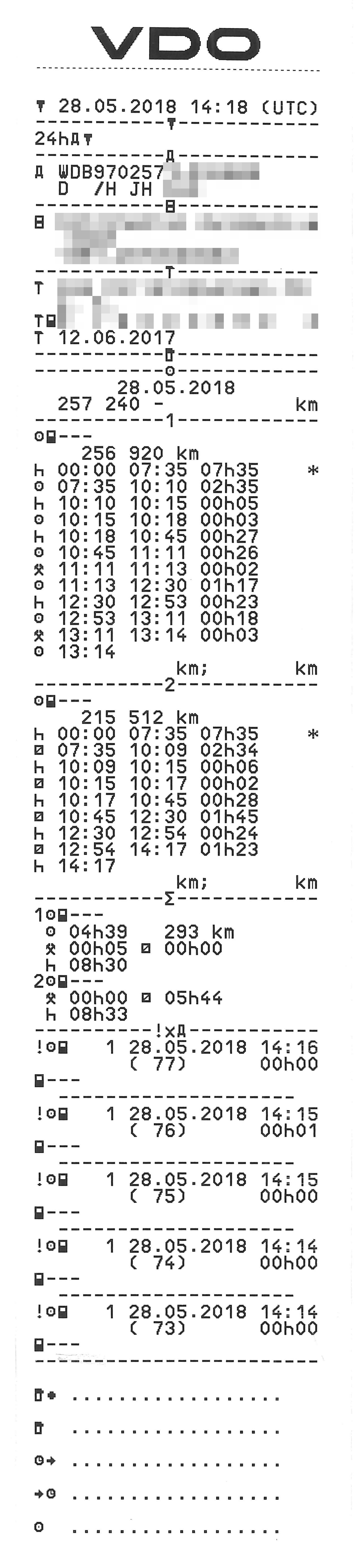 Ausdruck eines digitalen Tachographen. VDO. Automatische Erkennung von Lenk- und Ruhezeiten. Unkenntlich gemacht: Fahrgestellnummer, Kennzeichen, Firmenangabe, Fahrer